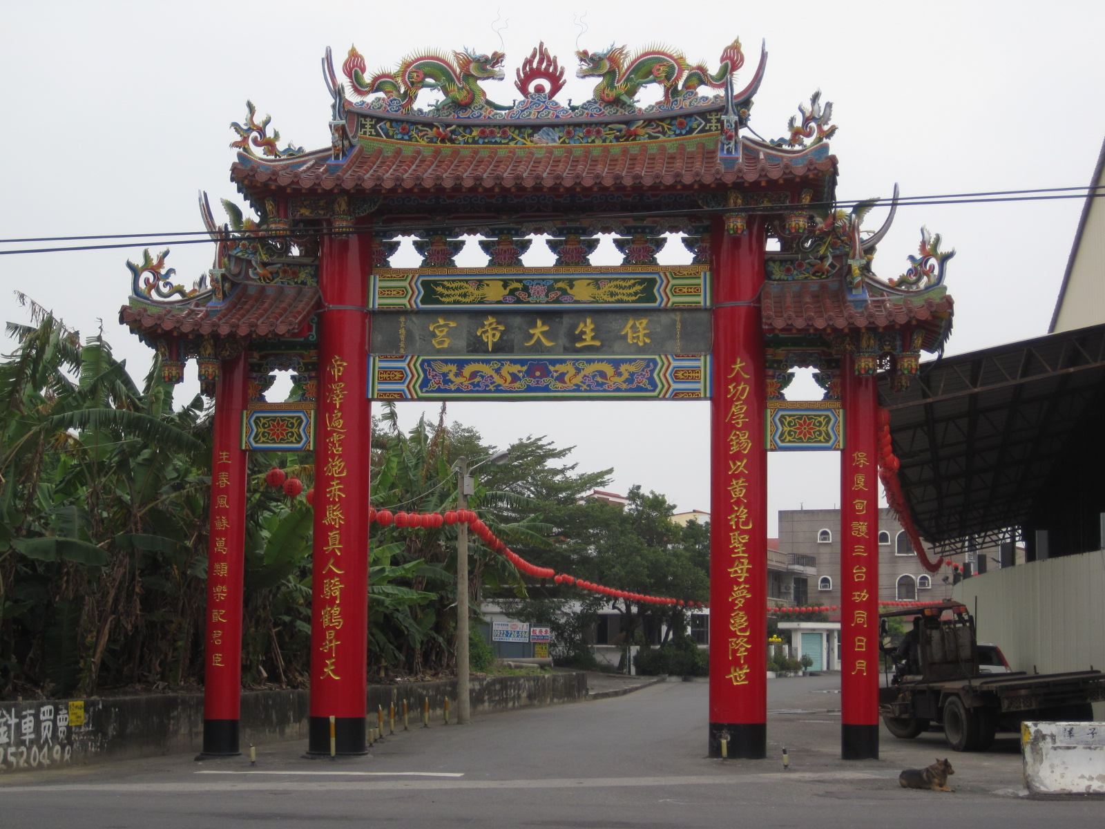 新化保生大帝宮牌樓